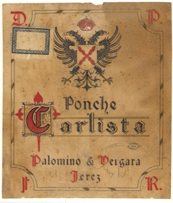 Ponche Carlista, produziert von Palomino & Vergara aus Jerez de la Frontera, Spanien